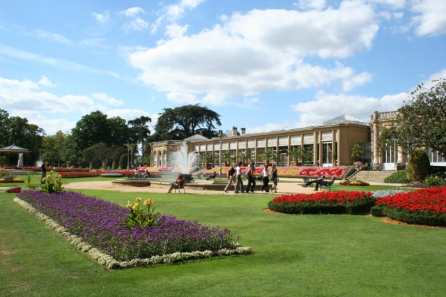 les serres du Thabor à Rennes